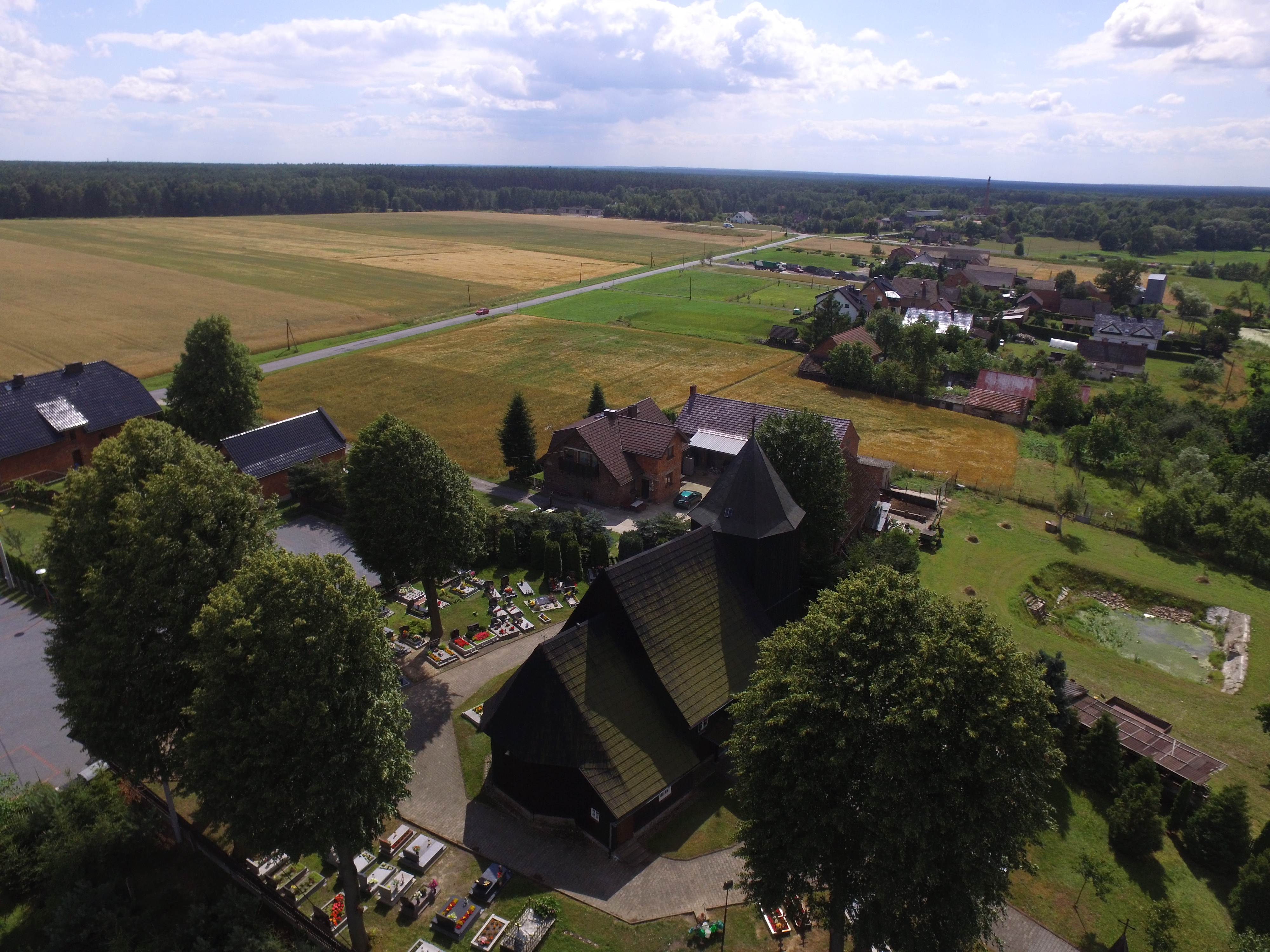 Kościół drewniany pw. św. Marii Magdaleny w Boroszowie